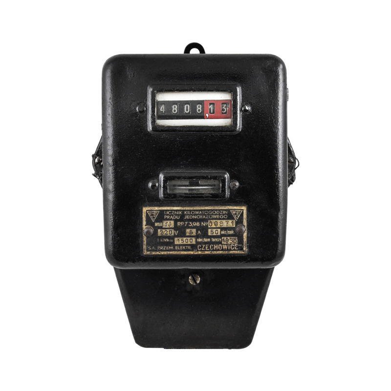 Licznik kilowatogodzin, 1935 rok. Ówczesna nazwa producenta: Spółka Akcyjna Przemysłu Elektrotechnicznego "Czechowice".